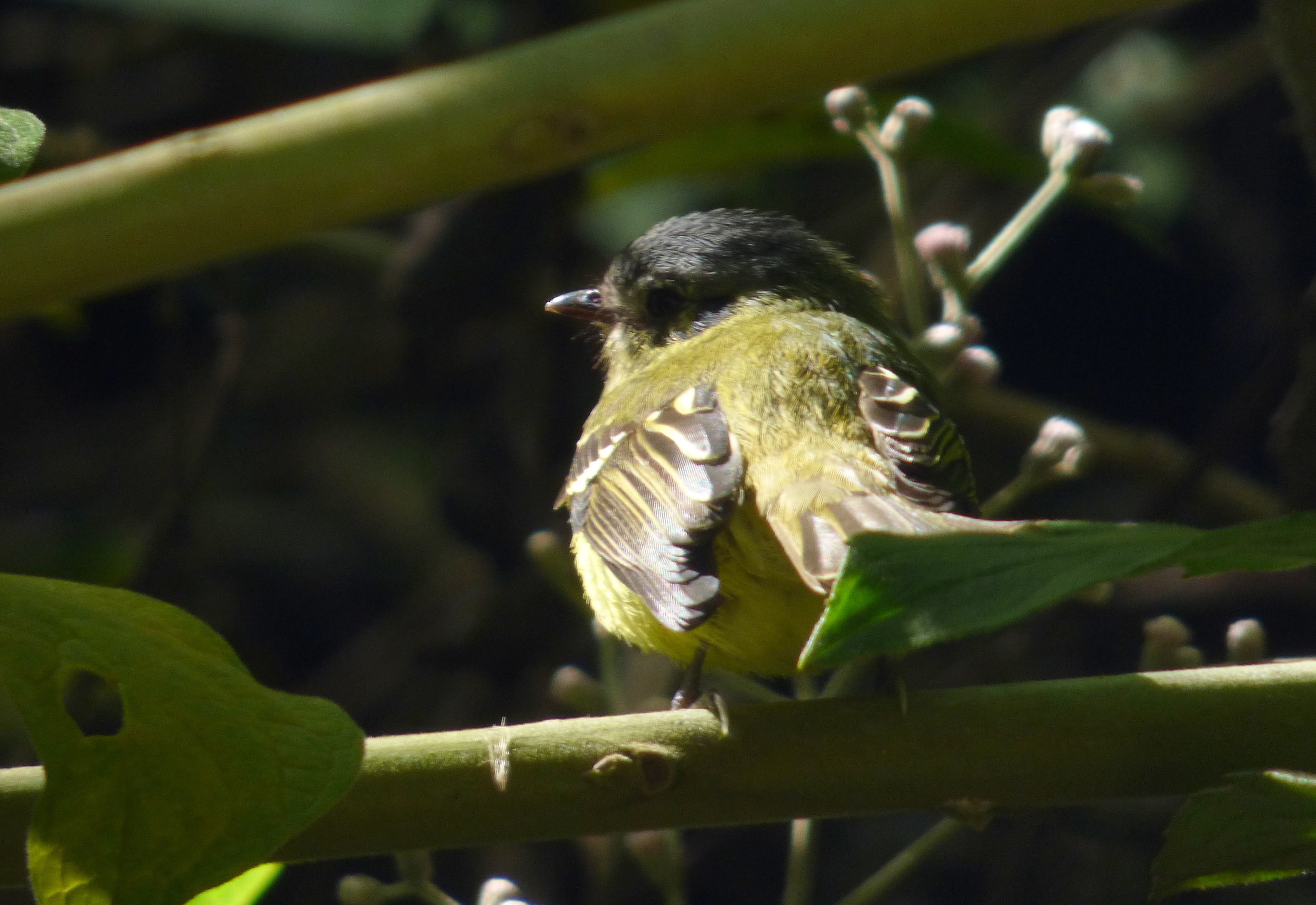 Phylloscartes poecilotis (Atrapamoscas variegado)